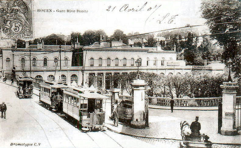 Tramway de Rouen - Gare rive droite